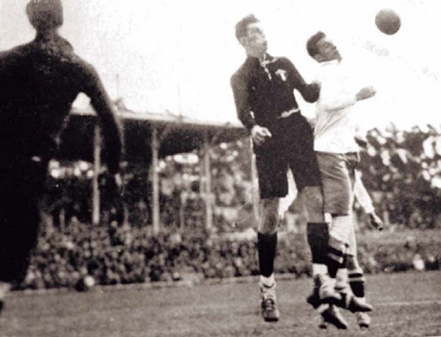 Partido entre Chile y México, disputado en el estadio Gran Parque Central por la Copa Mundial de la FIFA Uruguay 1930.